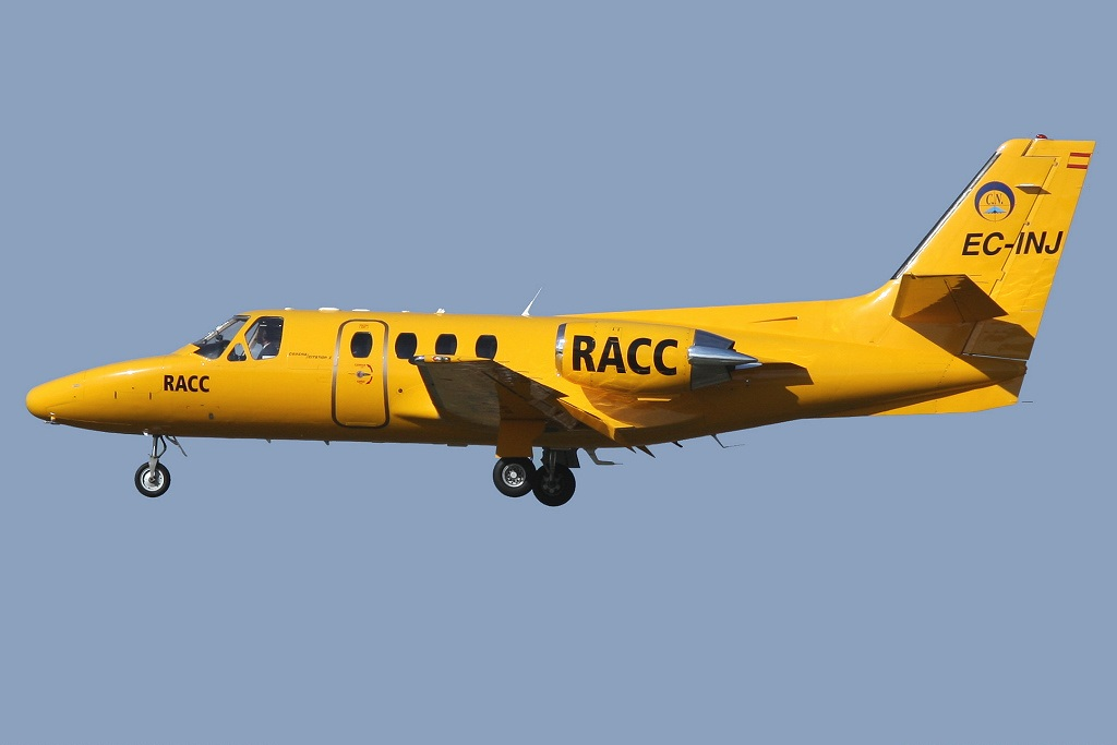 Cessna 501 Citation I/SP Barcelona (- El Prat) (BCN / LEBL) Spain, November 27, 2010 EC-INJ (cn 501-0086)